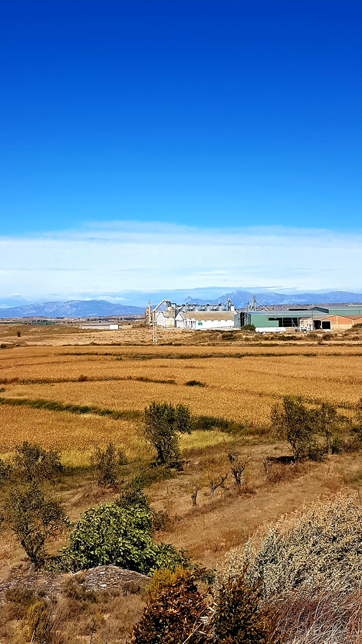 Aragonés: Campos e industrias de Granyén.